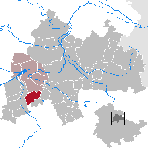 Riethnordhausen in Thuringia - District Sömmerda